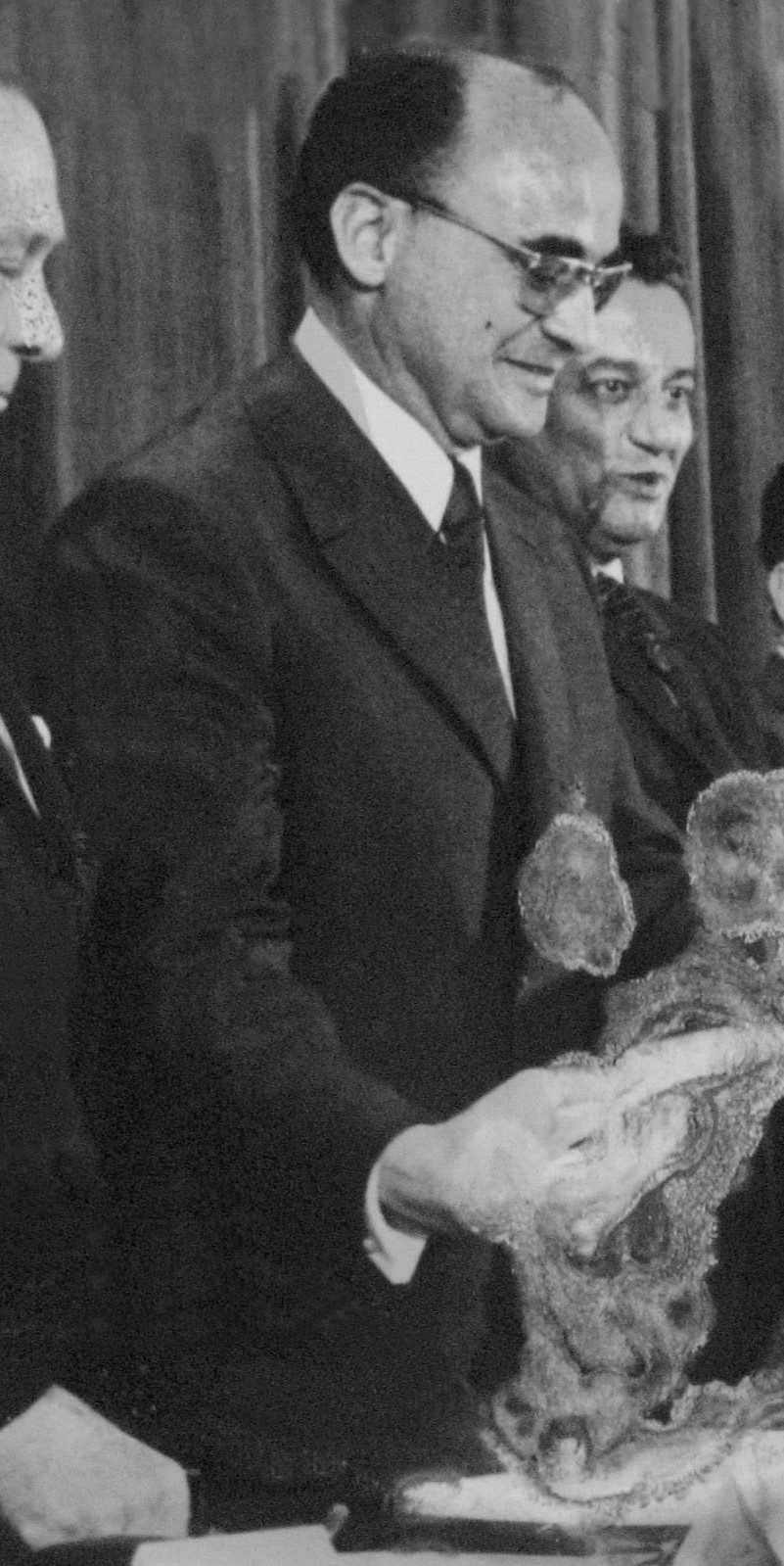 Ingeniero Oscar Vega Argüelles y el Ex Presidente mexicano Luis Echeverria Alvarez